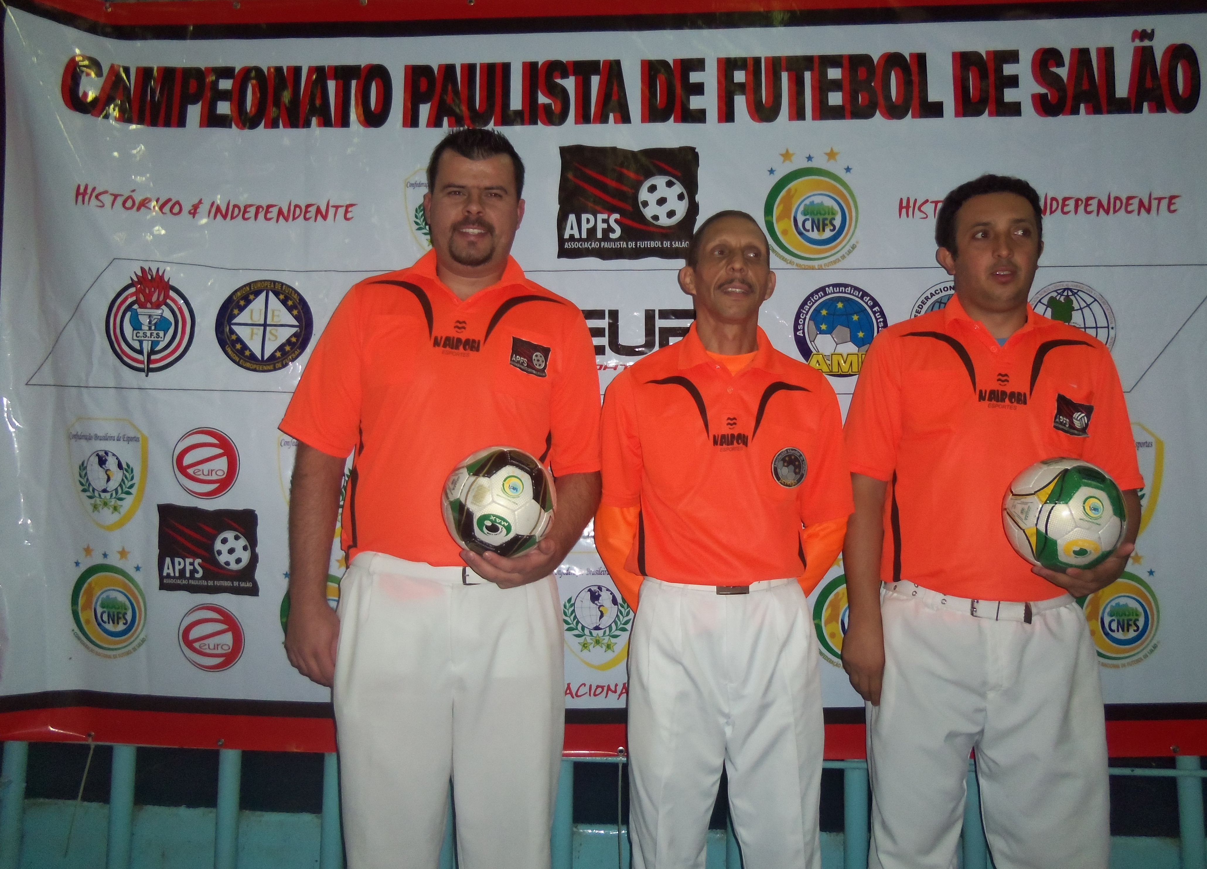 Arbitragem da Confederação Nacional de Futebol de Salão (CNFS) em ação no Campeonato Paulista da modalidade em 2013.